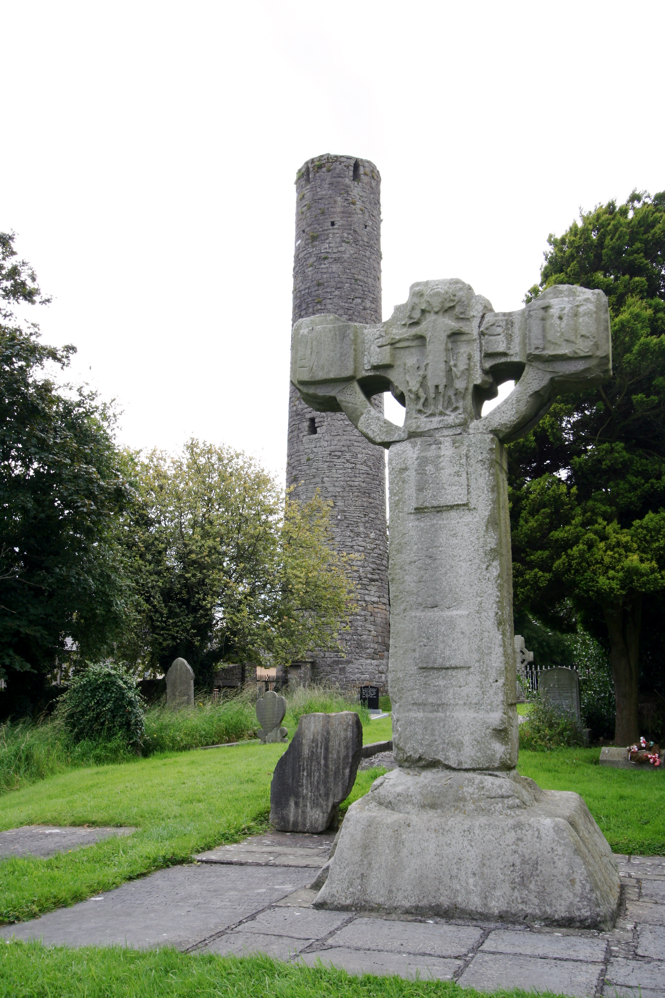 Kells Abbey, Kells, MeathMonasterio de Kells